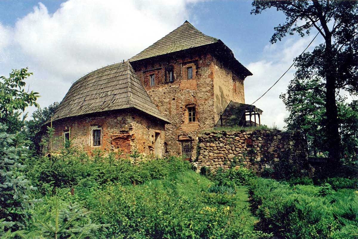 Witków - zamek